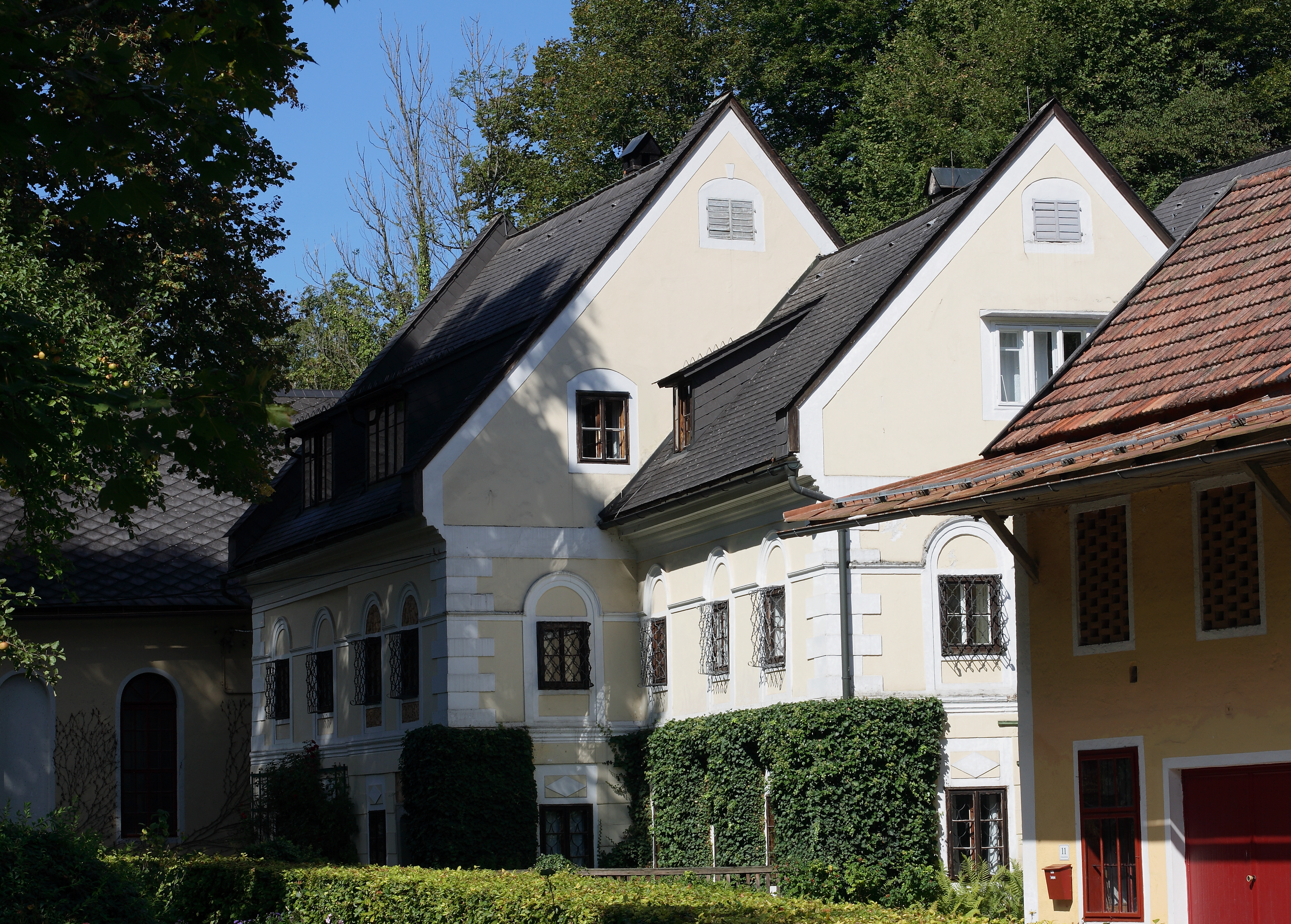 Das Alte Herrenhaus im Freilichtmuseum Schmiedleithen (Grünburg, Oberösterreich)